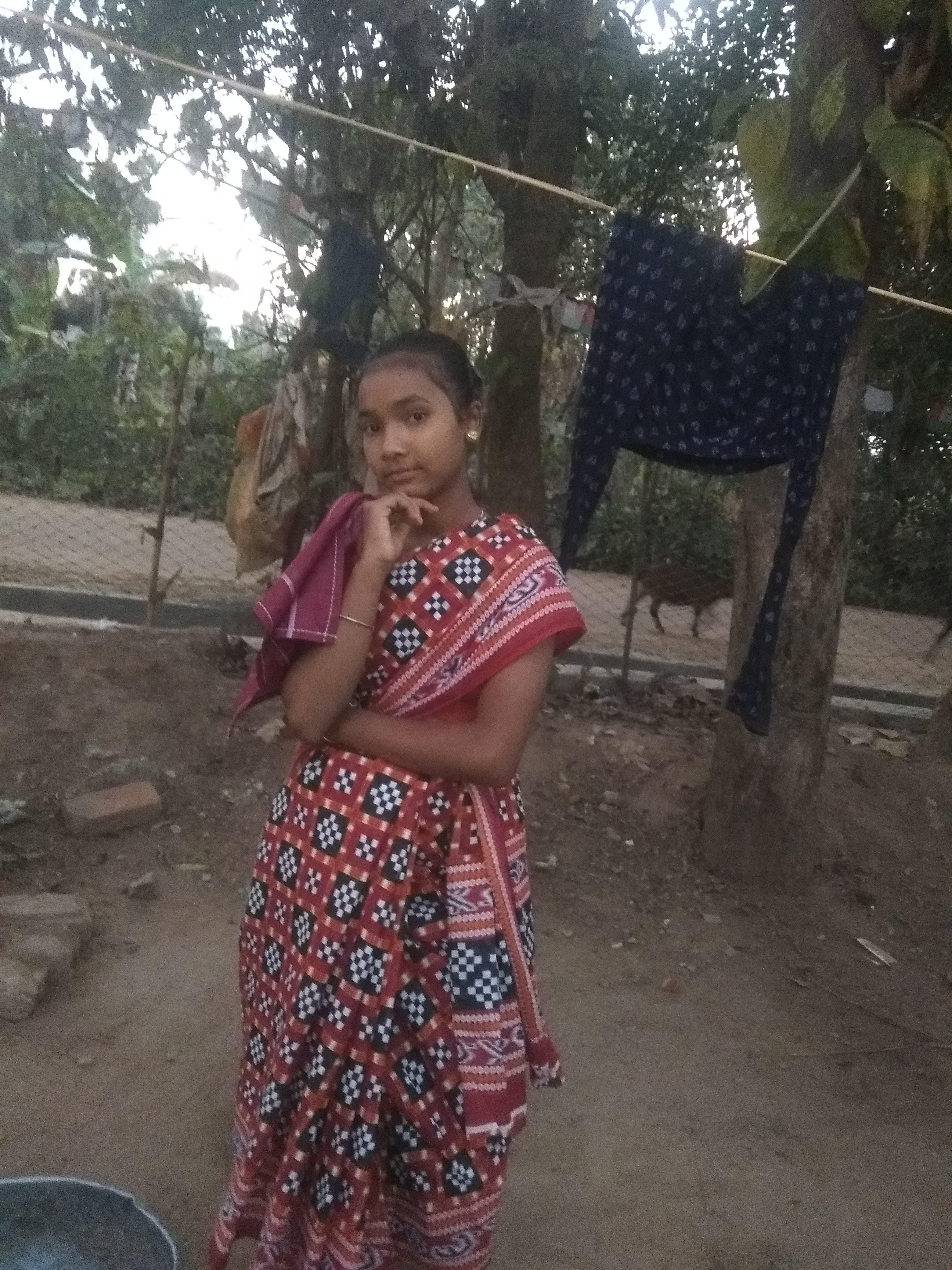 यह जाती सिर्फ इंडिया की ईस्ट कॉस्ट में मिलते है । यह जाती बिलुप्त है यह ओडिशा के एक जंगल की जगह में रहते है This photo has been taken in the country: India